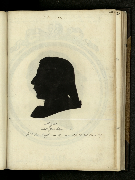 Schattenriss Porträt des stud. Friedrich Ludwig Wilhelm Meyer, imm. GÖ 25. April 1776, Sekretär der Hannöverschen Landsmannschaft im Sommer 1778, in der Silhouetten-Sammlung Schubert, Handschriften Abteilung der SUB Göttingen.